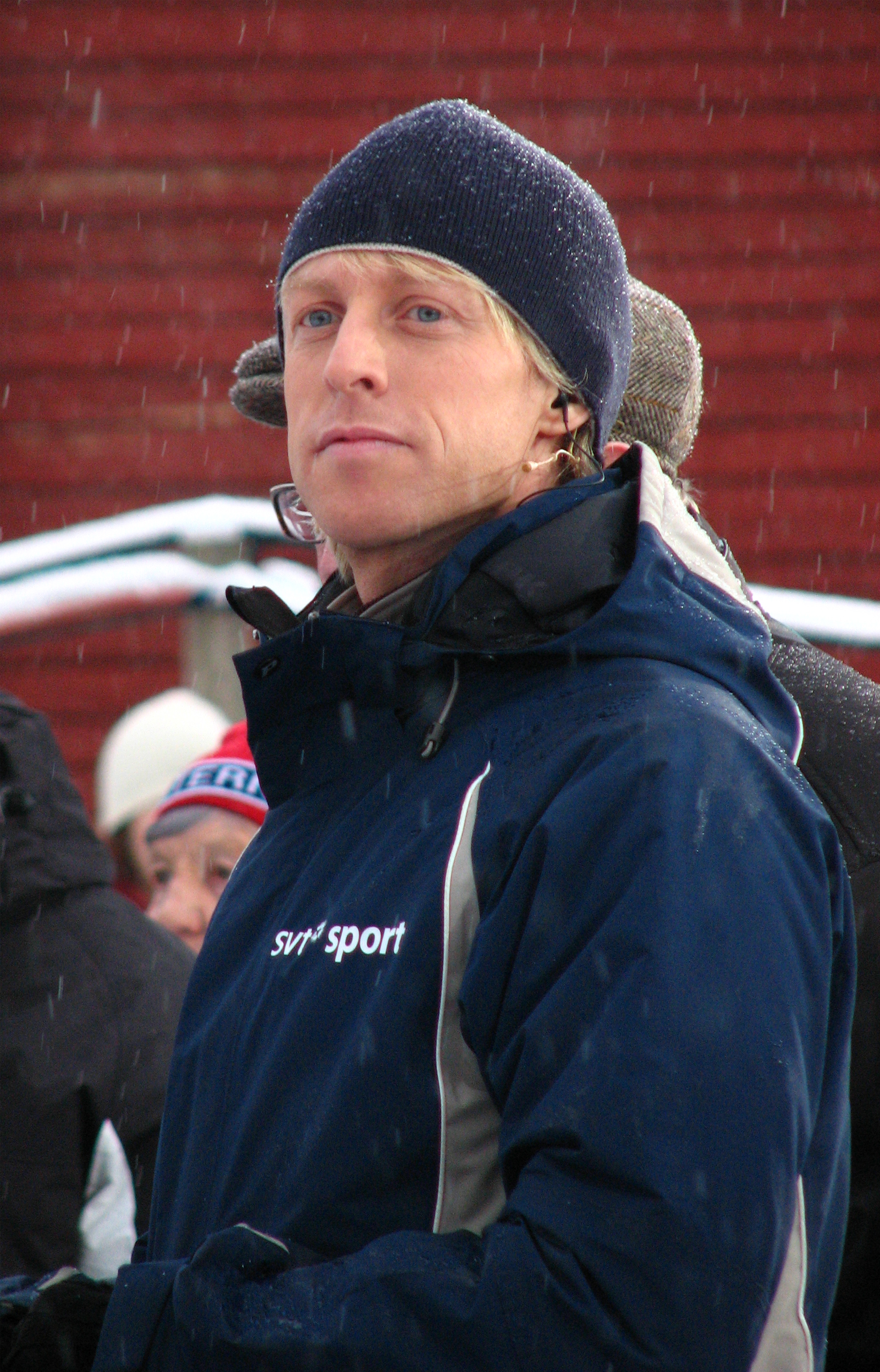 André Pops från SVT Sport vid vasaloppsstarten 2008. Sälen, Sverige